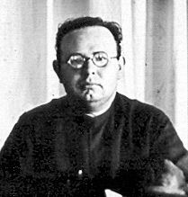 La estraro de IKUE dum la 14a Internacia Katolika Esperanto-Kongreso en Prago, 1929. De maldekstre: Marie Larroche, Joan Font i Giralt, Paulus Antonius Schendeler.